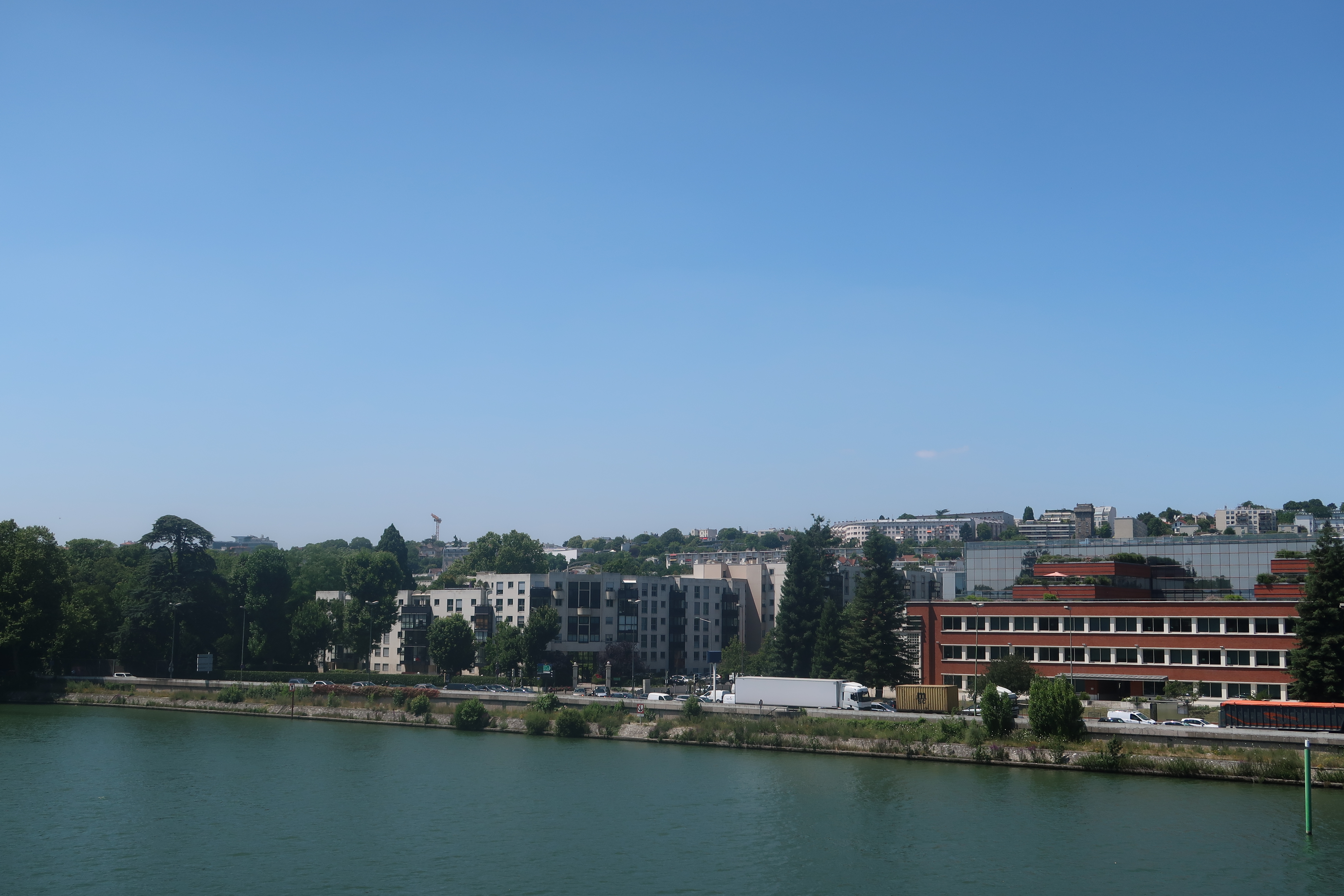 Siège social du groupe Havas vu du sud (ancienne parfumerie Coty, puis Usine Agfa Gevaert) à Suresnes.